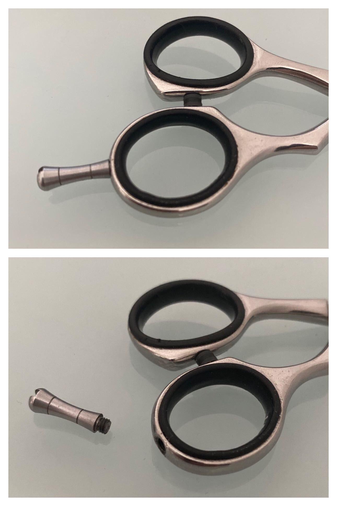 Dieses Bild zeigt ein Fingerhaken einer Haarschneideschere, den man an- oder abschrauben kann.